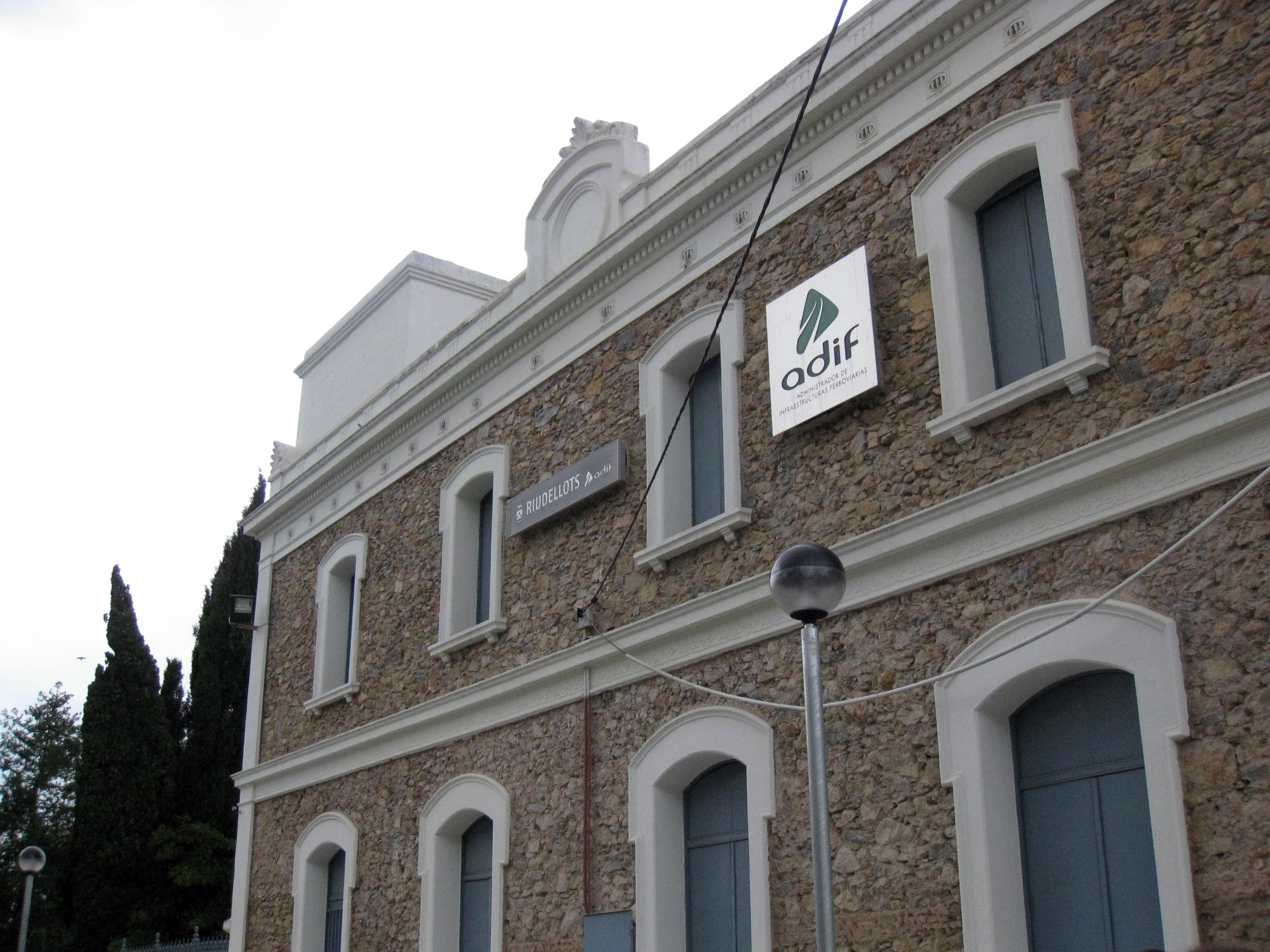 Estació de Riudellots (Riudellots de la Selva)